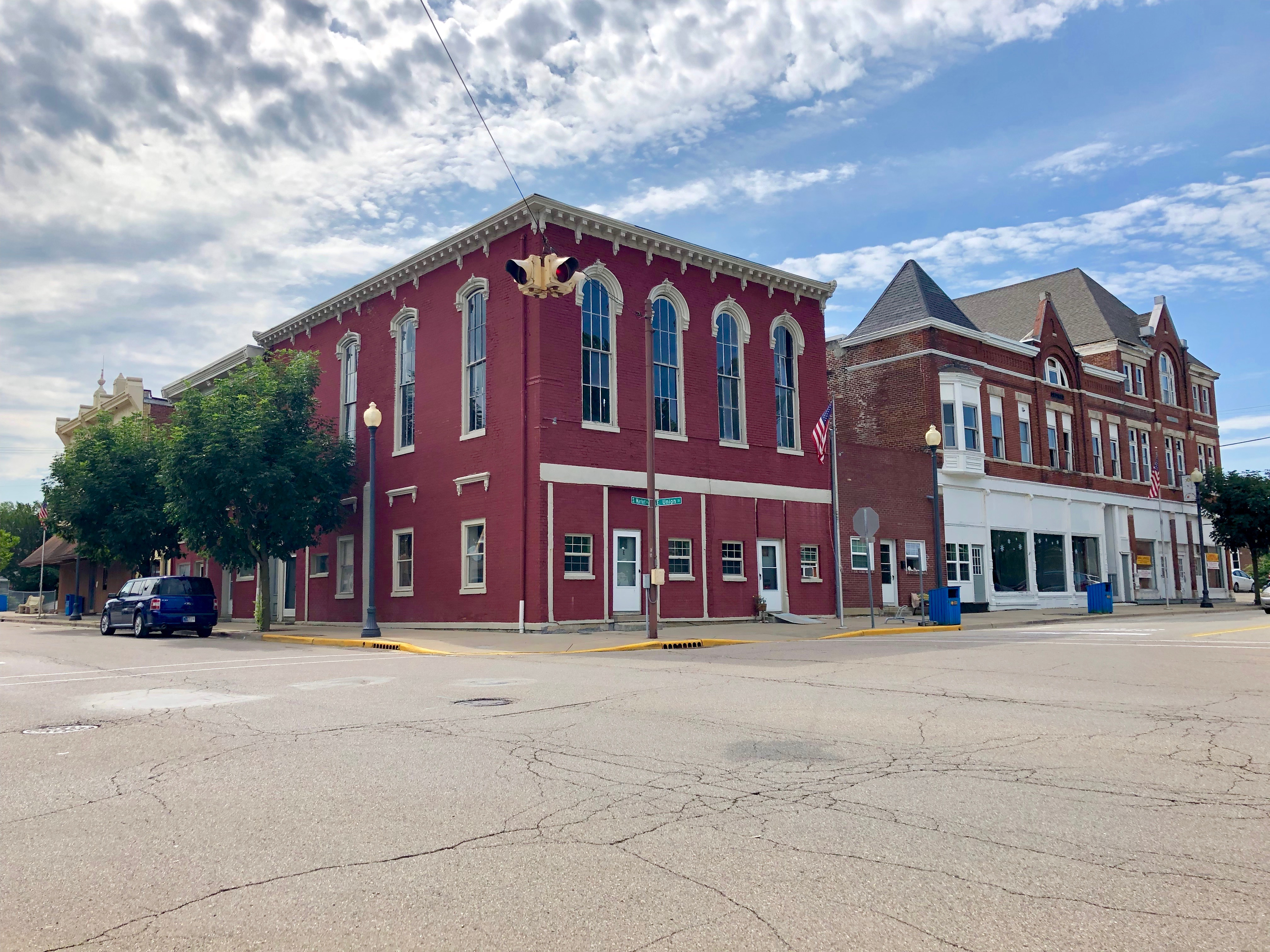 Market Street, Liberty, IN